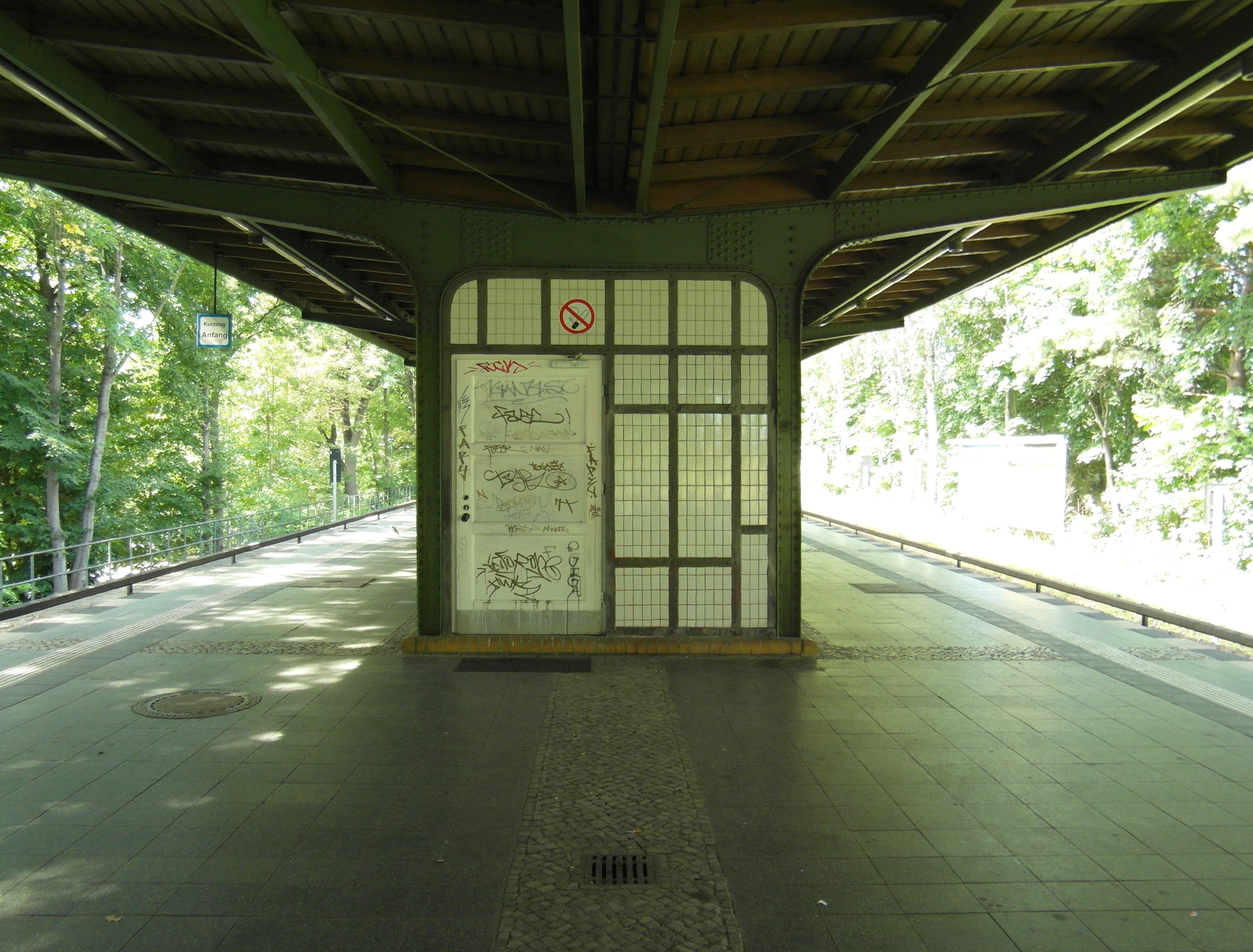 Linie S1